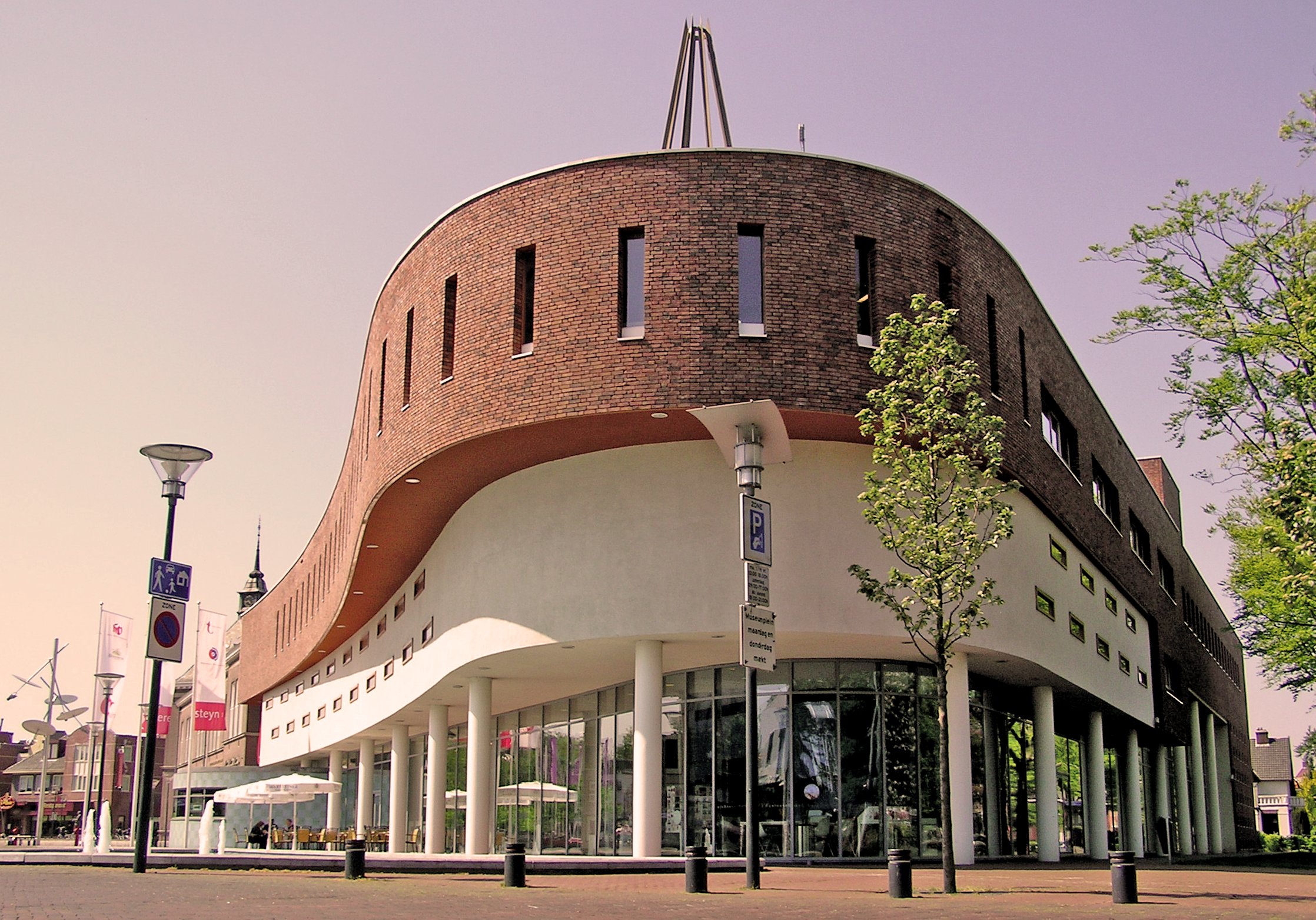 Van Beresteyn Cultural Center, Veendam, Netherlands